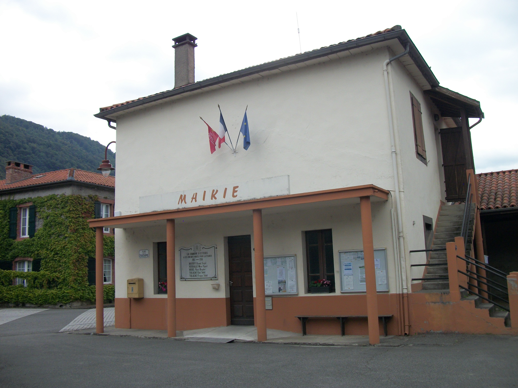 Esténos